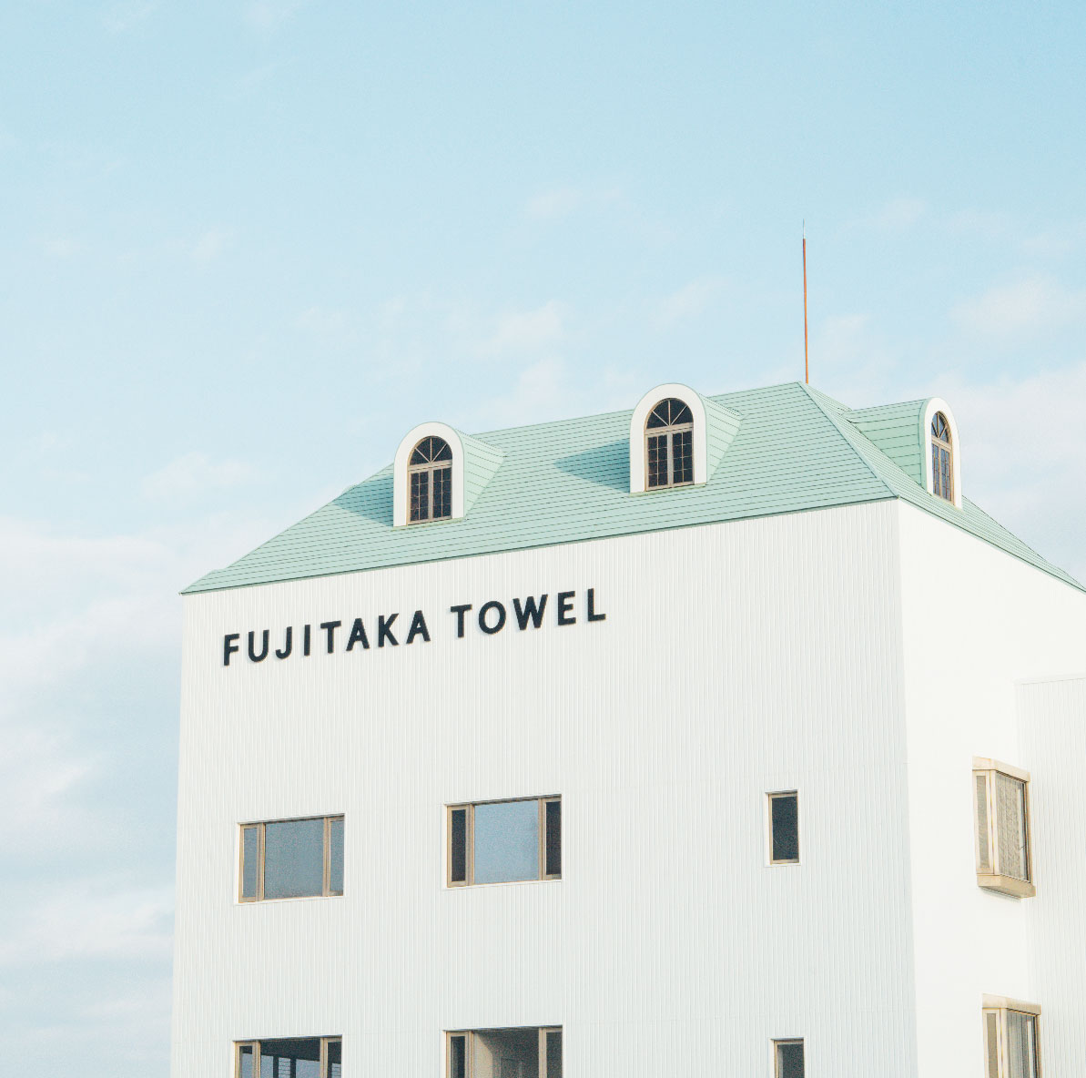 株式会社藤高本社写真